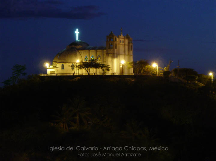 Iglesia del Señor del Calvario en Arriaga, Chiapas; México